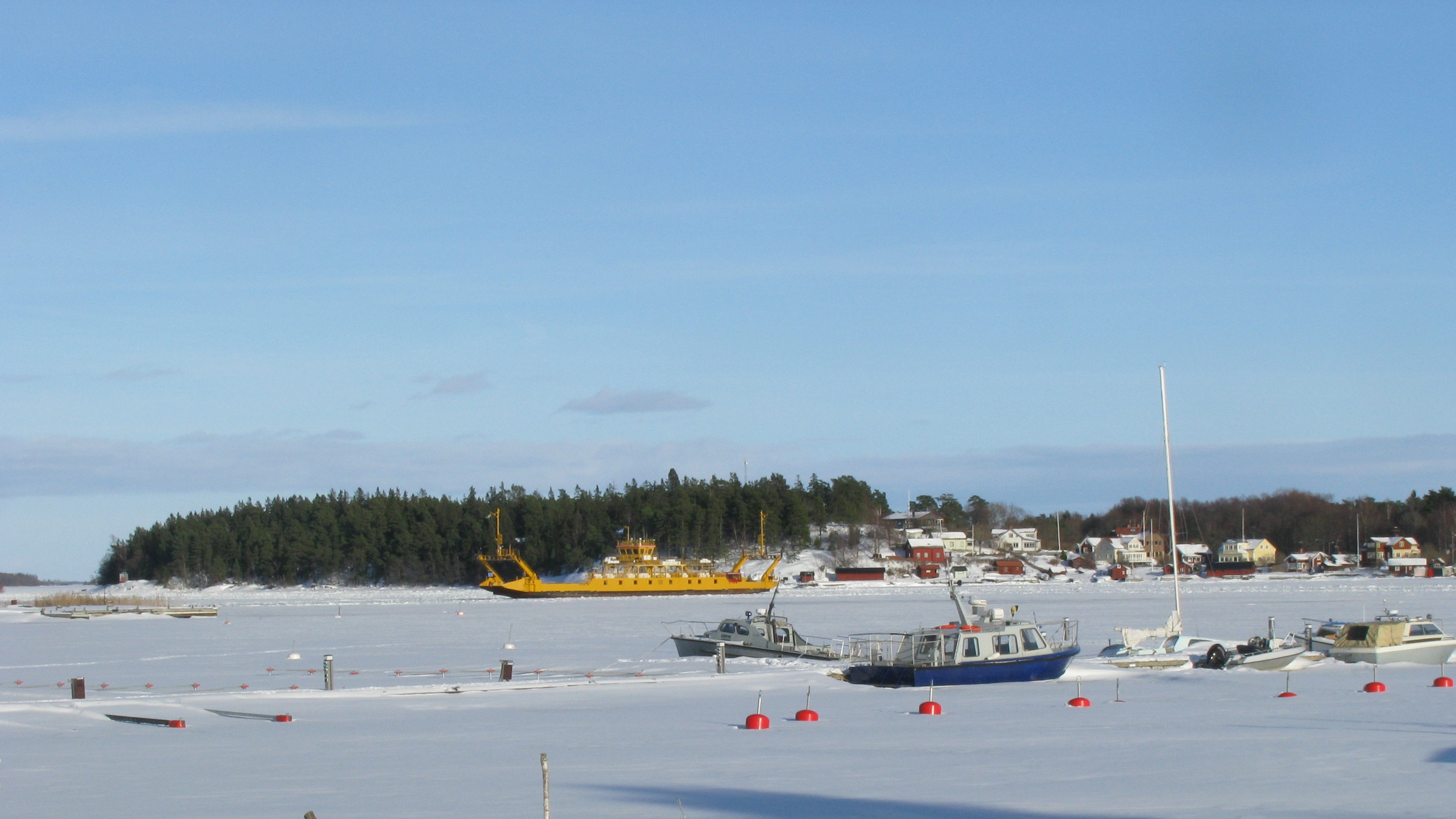 Vägverkets färja Yxlan på Furusundsleden mellan Furusund och Yxlan. Källa: eget foto, fotograf EnDumEn